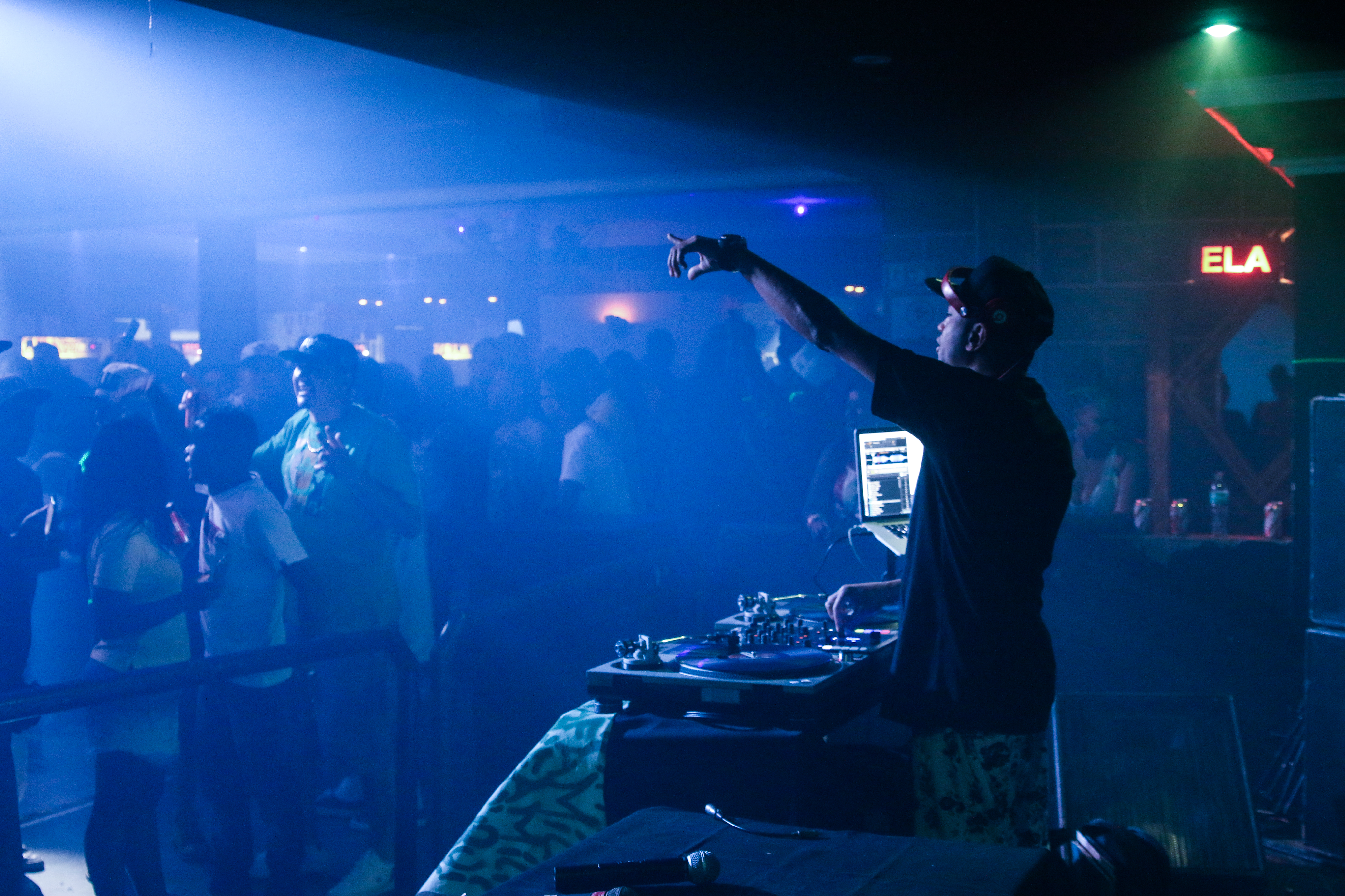 DJ Cia que integra o grupo de rap paulista em Limeria, se apresentou em uma casa de Show em 2015.